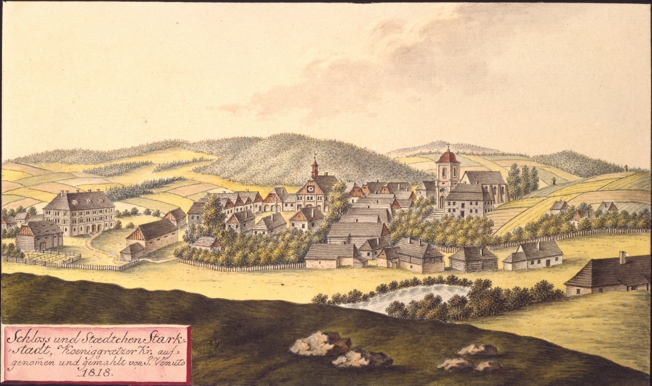 Stárkov. Schloss und Staedtchen Starkstadt, Koeniggraetzer Kr. aufgenommen und gemahlt von J. Venuto 1818